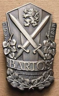 Pamětní odznak Vojenského velitelství Velké Prahy – Bartoš (anglicky: Commemorative Badge of the Military Command of Great Prague - Bartoš) je v horních dvou třetinách tvořen mírně vypouklou husitskou obrannou pavézou. Na horní části této pavézy je centrálně umístěna heraldická postava lva ze státního znaku Československé republiky. Lev se "vznáší" nad zkříženými meči, jenž směřují ostřími vzhůru a jsou obklopeny po vnějších stranách lipovými ratolestmi. Po horních stranách pavézy (nad ratolestmi) jsou dva ozdobné výstupky. Na levém je nápis: "5. - 9. V." a na pravém pak: "1945". V dolní části pavézy je stočená nenápadná kovová stuha s nápisem: "Voj. velitelství Velké Prahy". Nad touto páskou je podstatně širší a nápadnější stuha s velkým nápisem: "Bartoš". Nejnižší dolní část odznaku v prostoru pod nenápadnou kovovou stuhou je orámována (uzavřena) osově symetrickou dvojicí lipových ratolestí. Na rubové straně odznaku se nachází registrační číslo odznaku; odznak se předával s osvědčením a měl rozměry: výšku 50 mm, šířku 31 mm v horní části a šířku 22 mm v dolní částibadge.